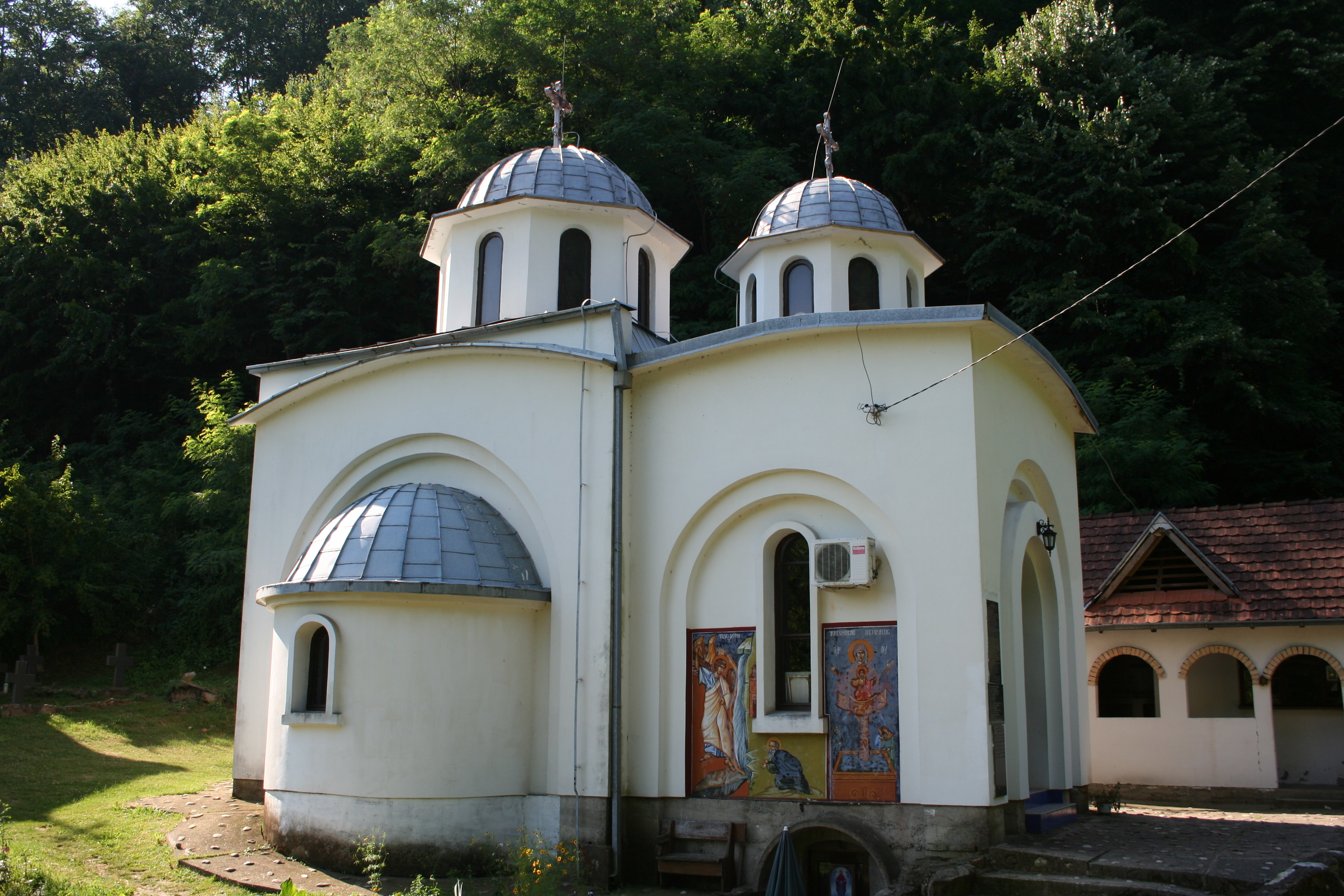 Manastir Radovašnica